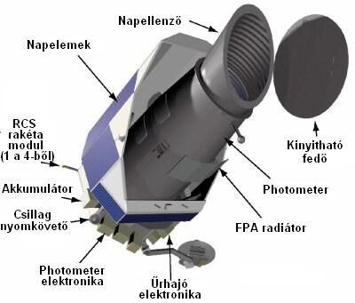 A Kepler űrtávcső címkézett illusztrációja